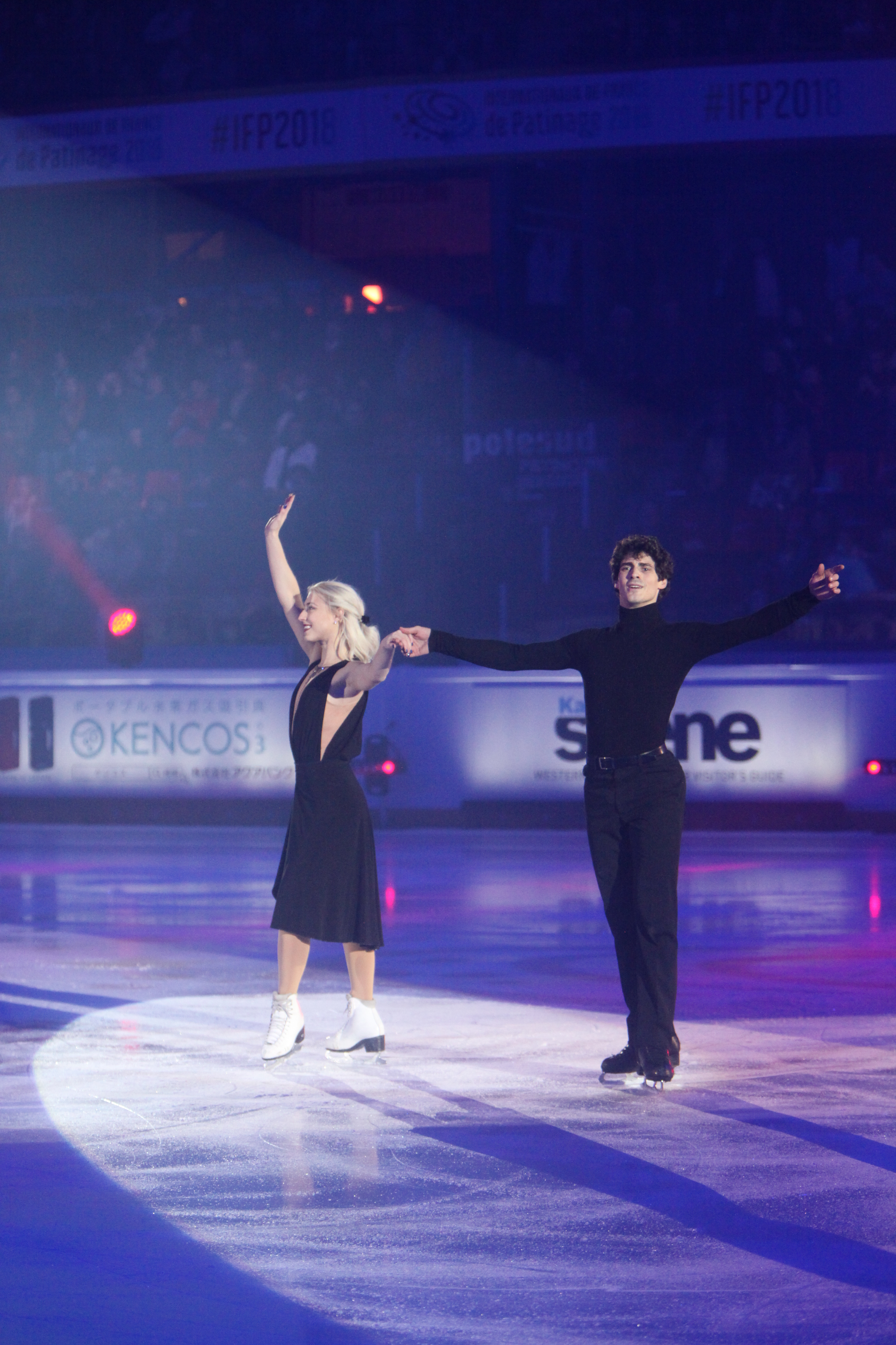 Piper Gilles and Paul Poirier during the gala at the Internationaux de France de Patinage 2018.